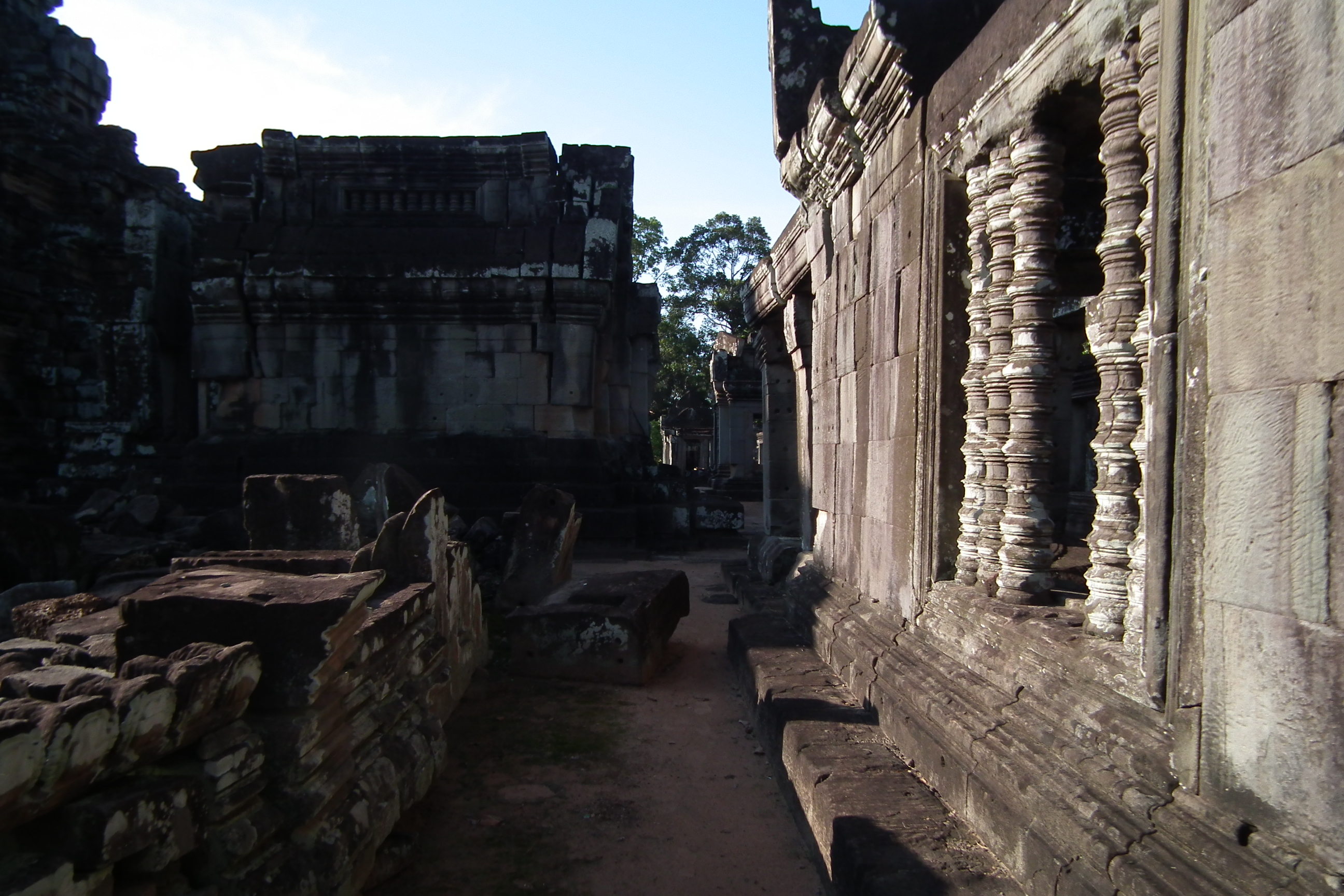 Ta Keo (Khmer: ប្រាសាទតាកែវ) Angkor Cambodia タ・ケウ